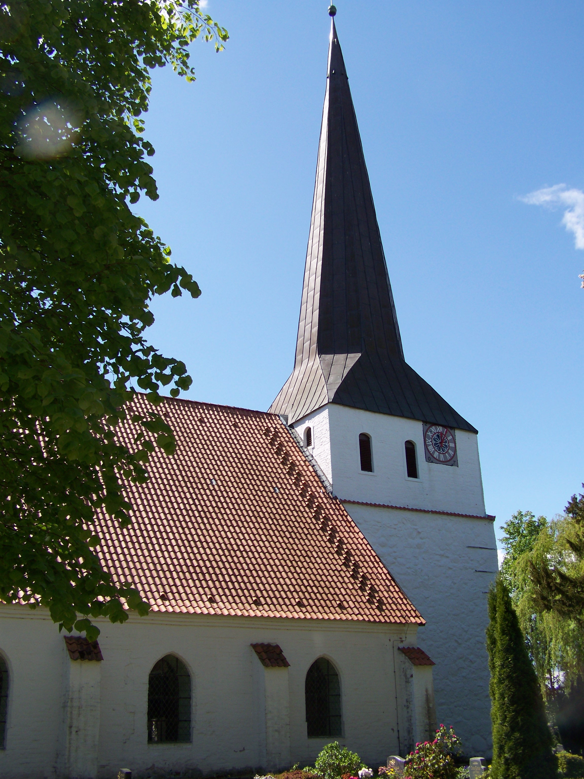 Die Kirche in Groß Bisdorf, Deutschland, Landkreis Nordvorpommern (2009-05-13).